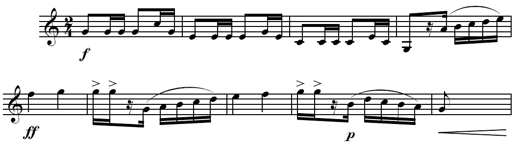 Melodie in den Anfangstakten des San-Lorenzo-Marsches